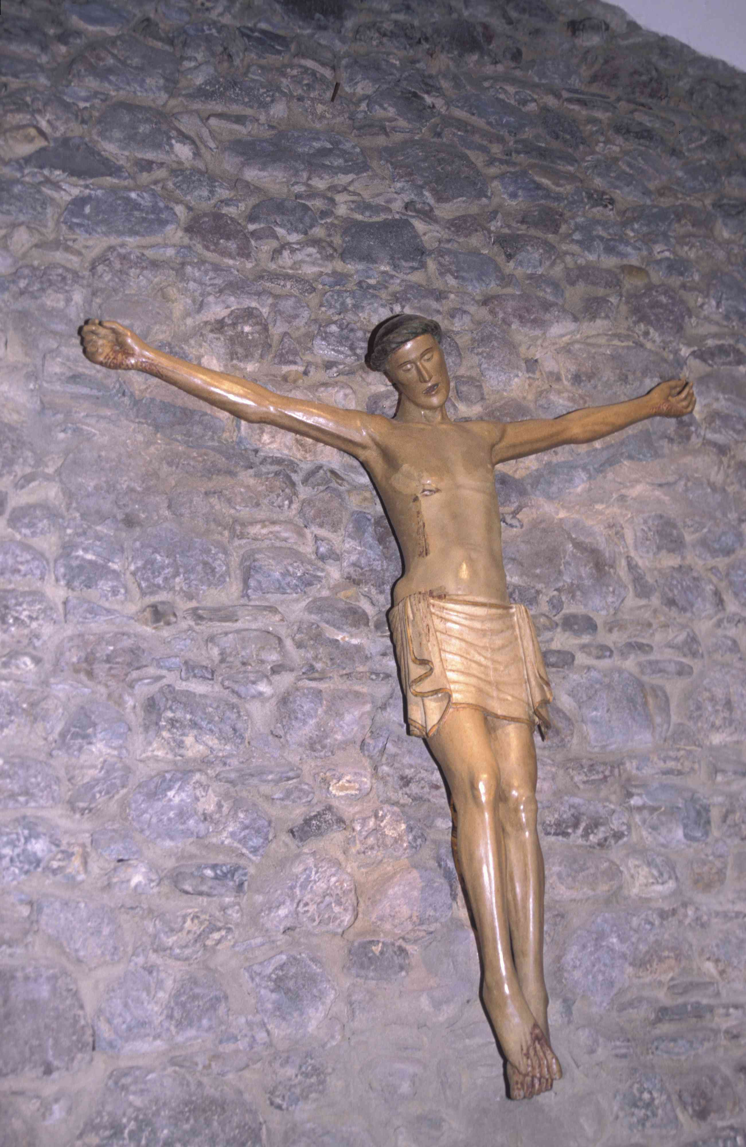 Cristo imberbe. Uno de los pocos que existen en todo el mundo.